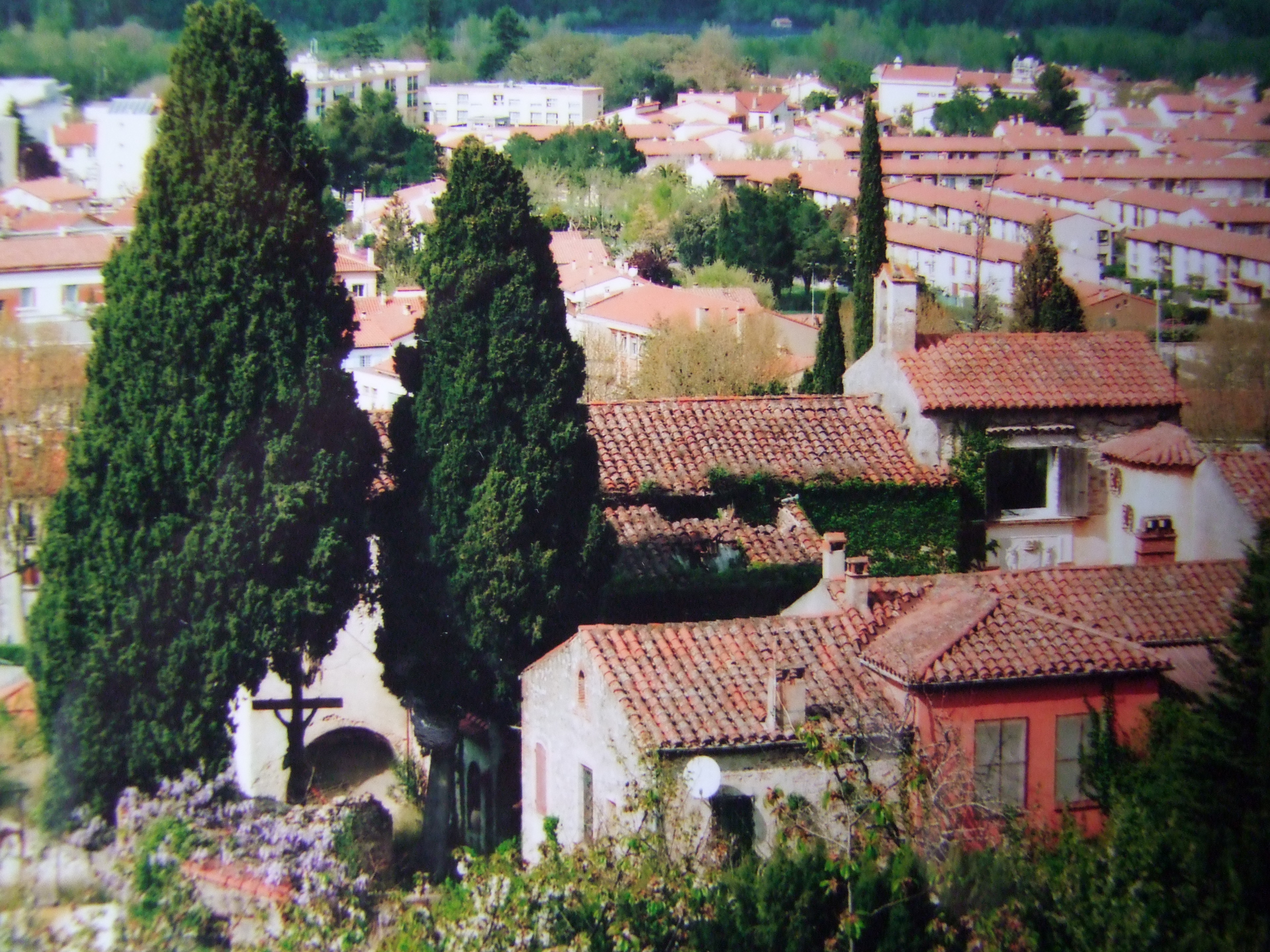 En avril 2009,cette vue S.O. présente encore assez fidèlement la vocation religieuse passée du site, notamment le grand crucifix et ses 2 cyprès acolytes séculaires, jusqu'au début de l'automne 2012. Photo originale en argentique provenant du travail personnel du même auteur que le présent tirage en numérique.